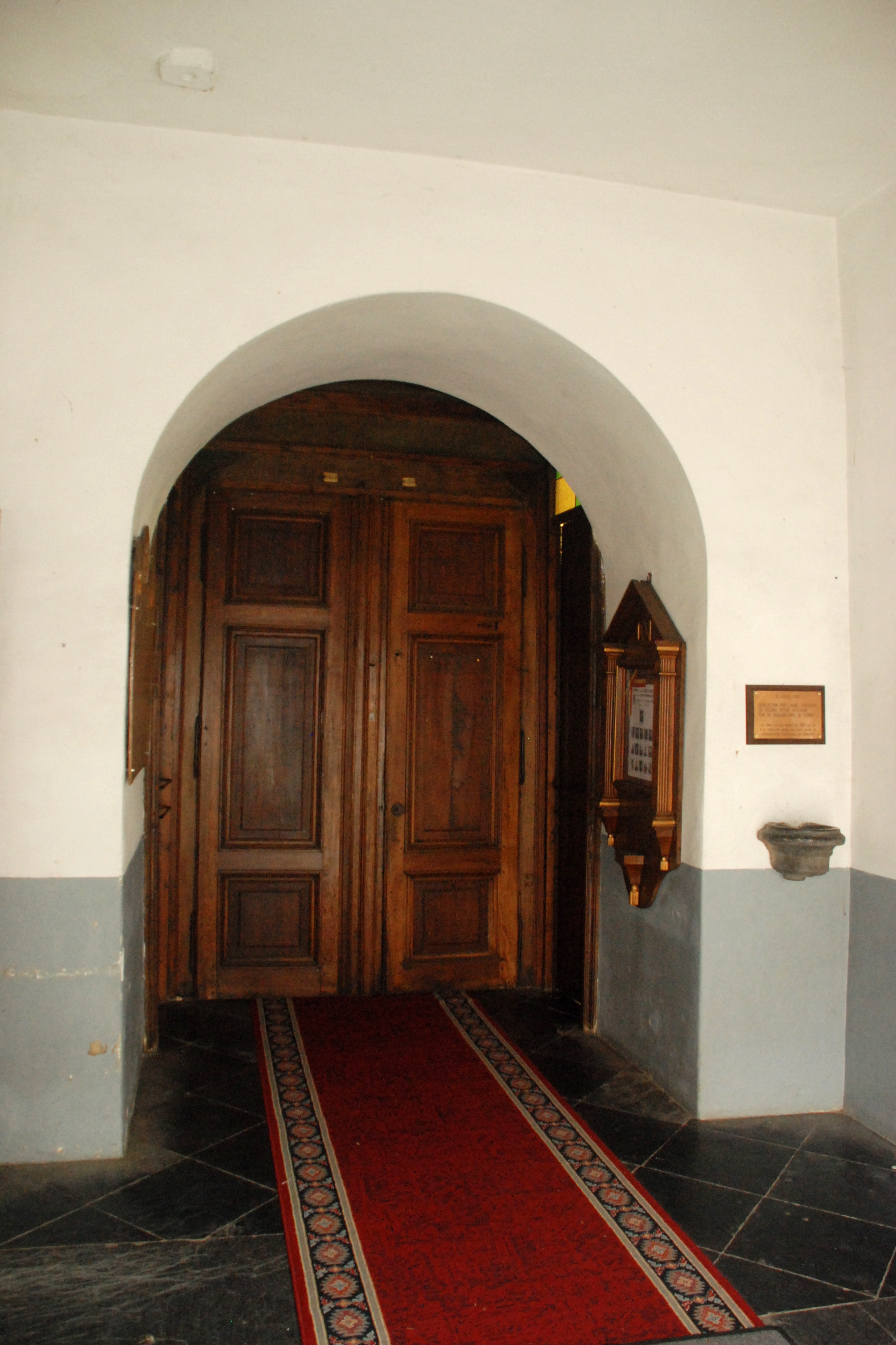 Belgique - Église Saint-Barthélémy de Bousval